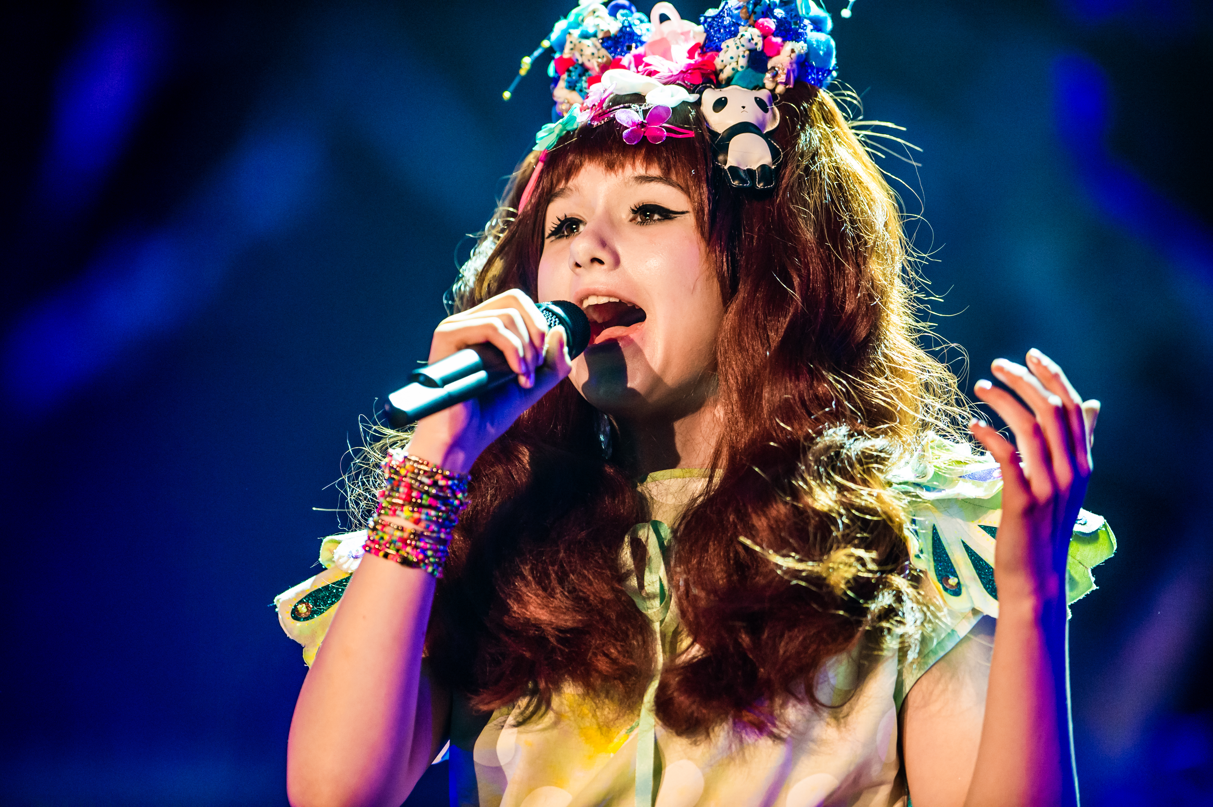 Eurovision Song Contest 2016 - Unser Lied für Stockholm - Jamie-Lee Kriewitz